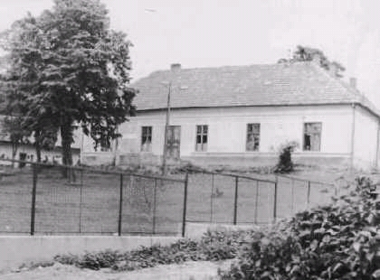 1930 Obecny Urad